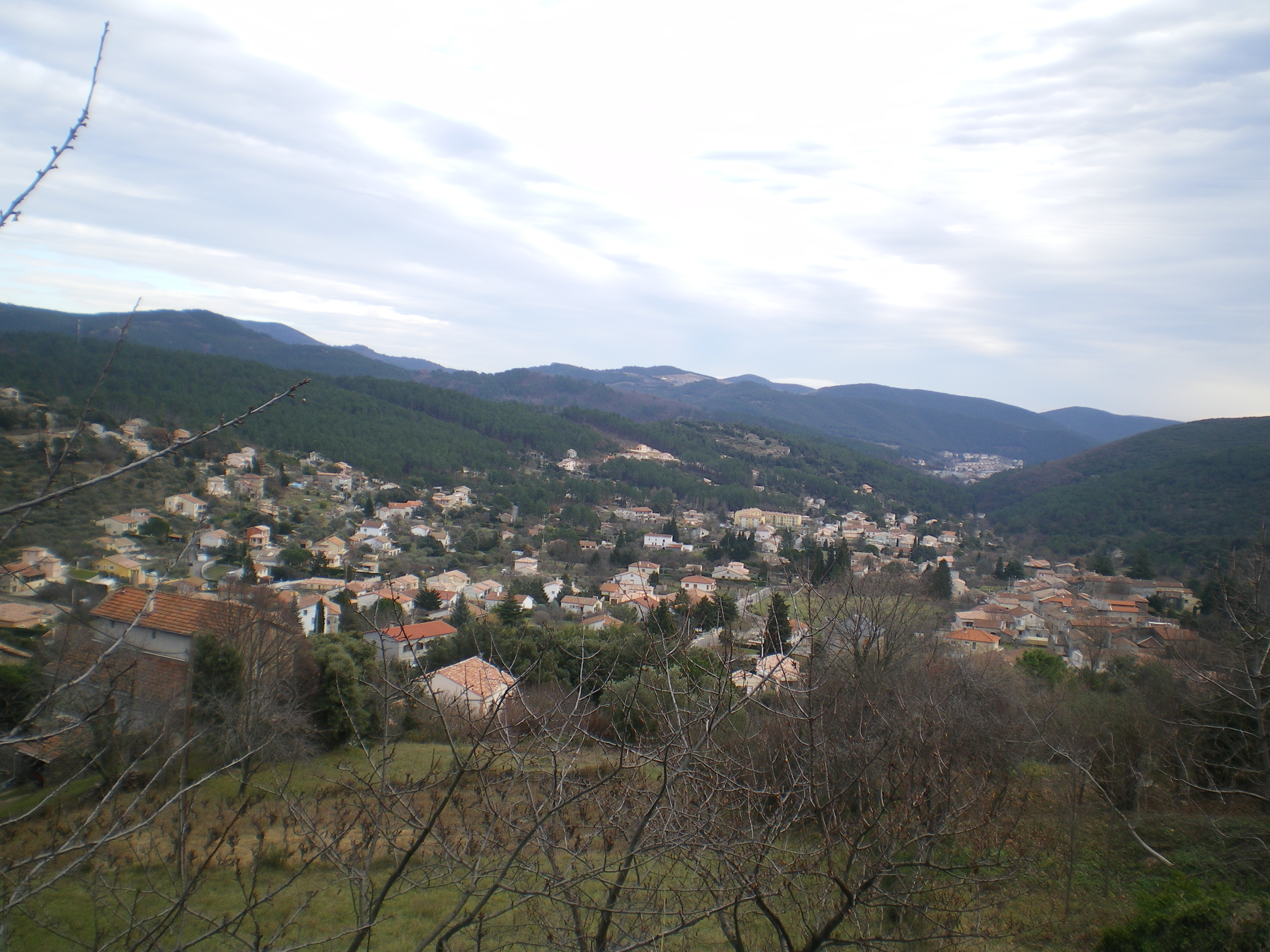 Vue générale de Branoux